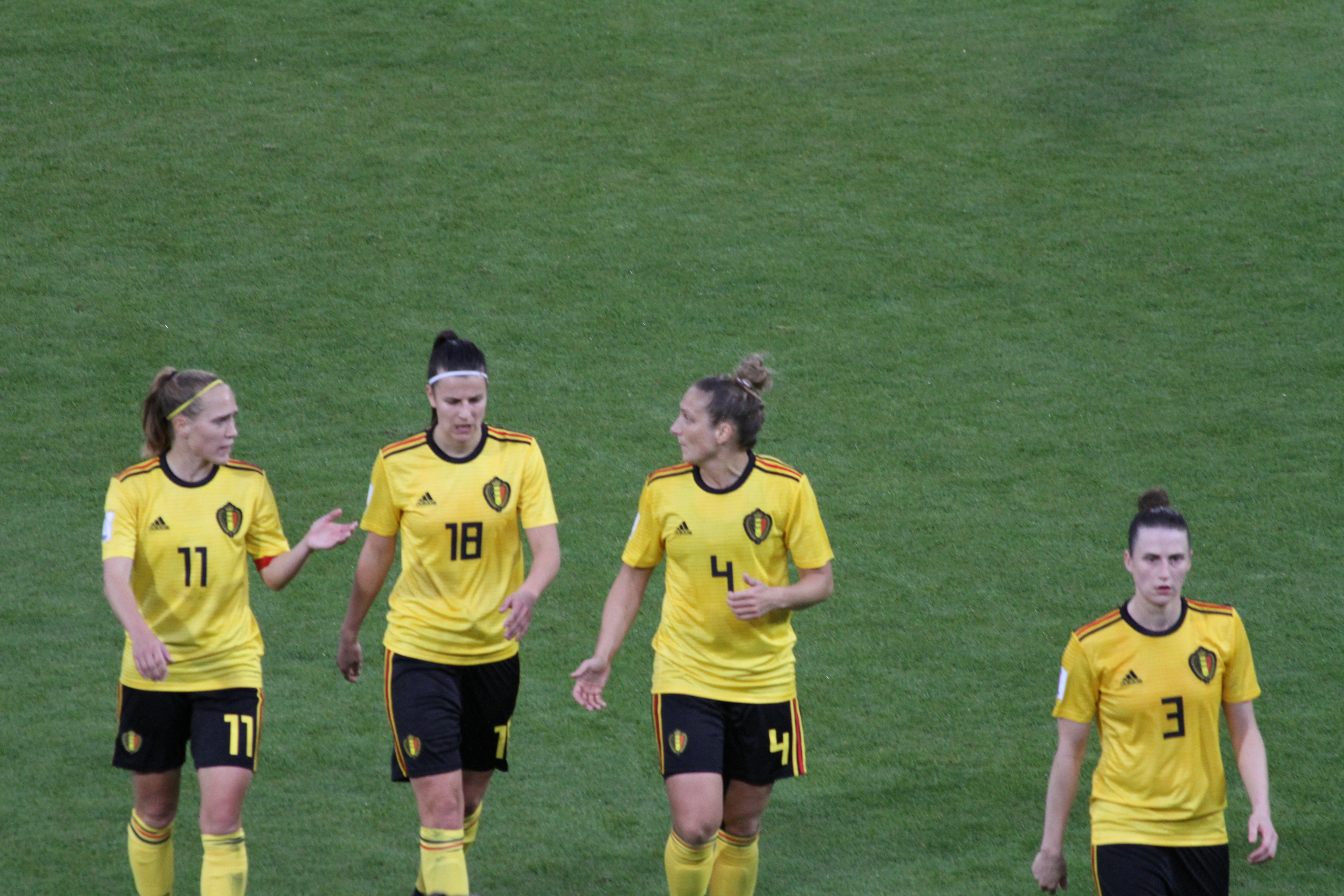 Ferrara, 10 aprile 2018, Stadio Paolo Mazza: Italia vs Belgio, qualificazioni al Mondiale di Francia 2019. Cayman, De Neve, Coutereels e Jaques.